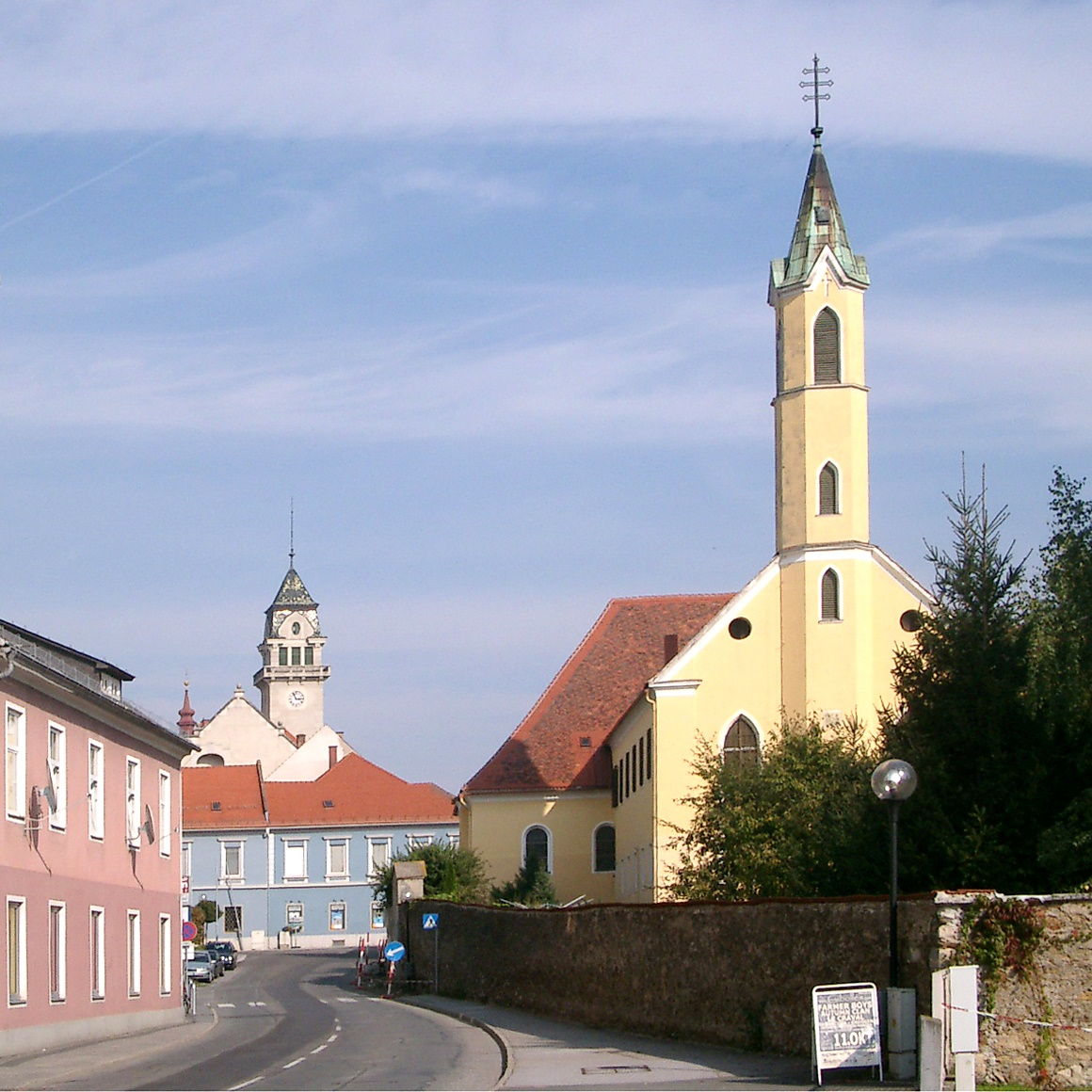 Kapuzinerkirche hl. Andreas